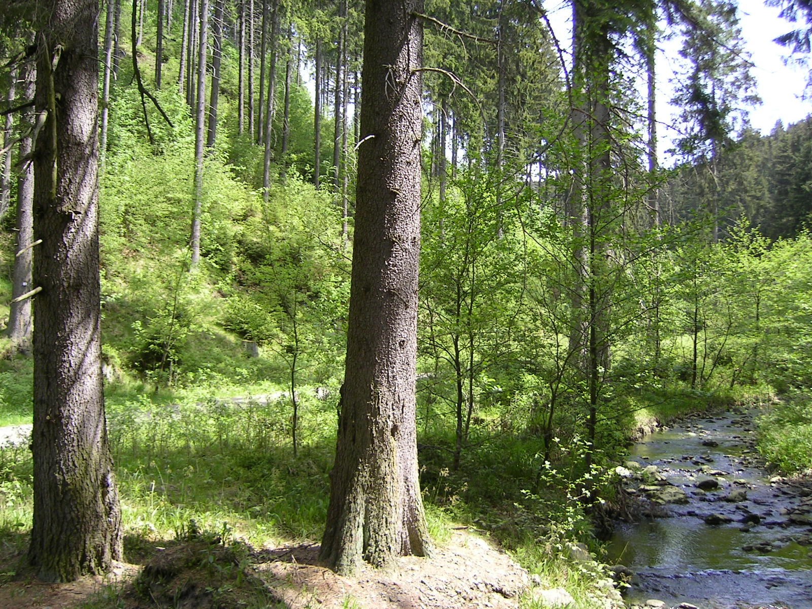 Das Kellwassertal